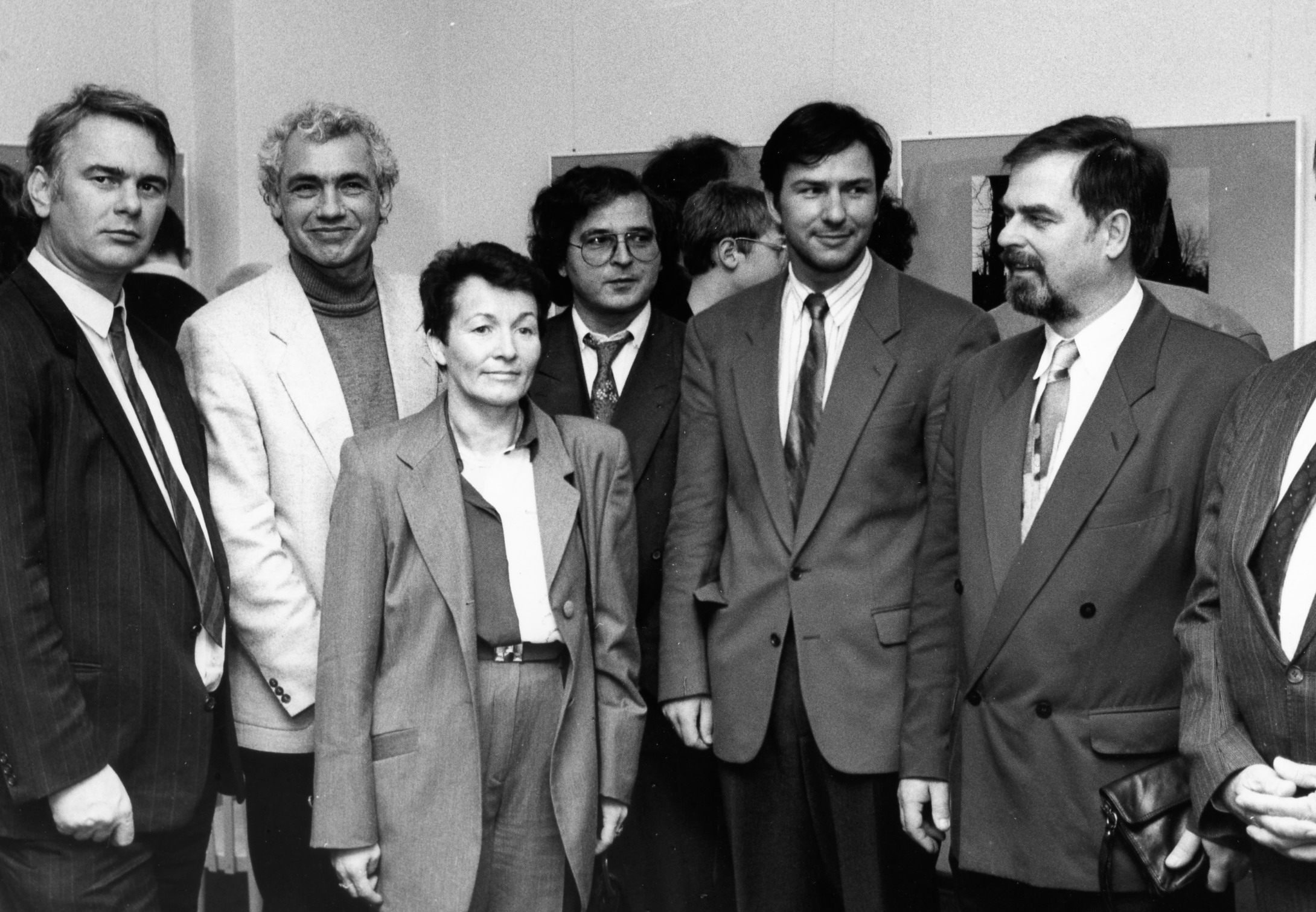 „Geschichte des Kirchenbaus im Kreis Zossen“: Ausstellungseröffnung am 10.11. 1991 mit Peer Giesecke (Landrat, mit seiner Kreis-Kultur-Referentin), Ulrich Waack, Wilfried Postier (Heimatmuseum Tempelhof), Klaus Wowereit (Volksbildungsstadtrat Berlin-Tempelhof), Steffen Rainer Schulz (Superintendent Kirchenkreis Zossen) (von links).